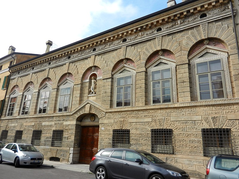 Mantova - Casa di Giulio Romano